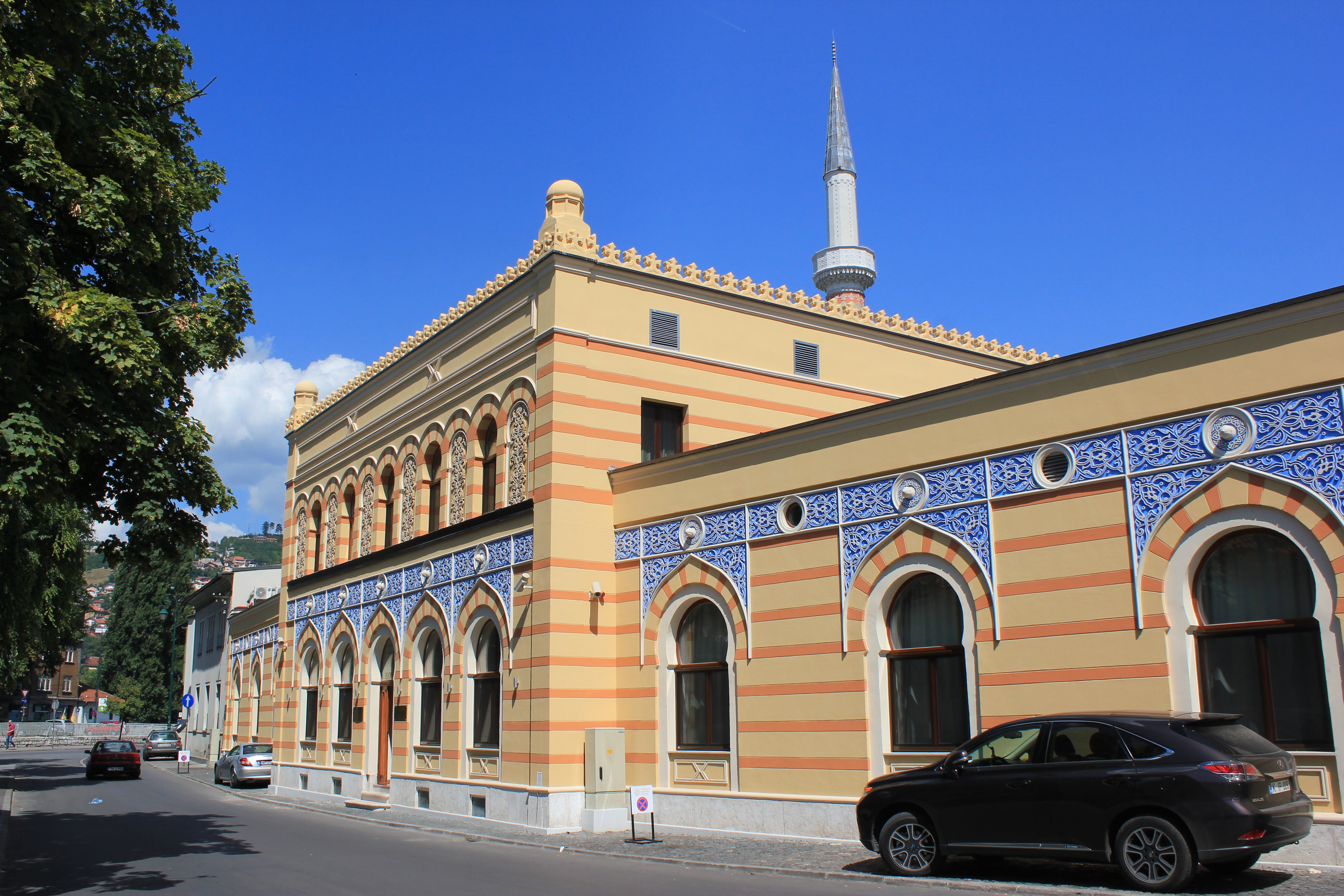 Sarajevo; Isa-Beg-Hamam (heute Hotel).